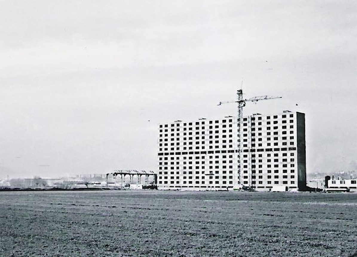 Primer bloque Bellvitge 1965